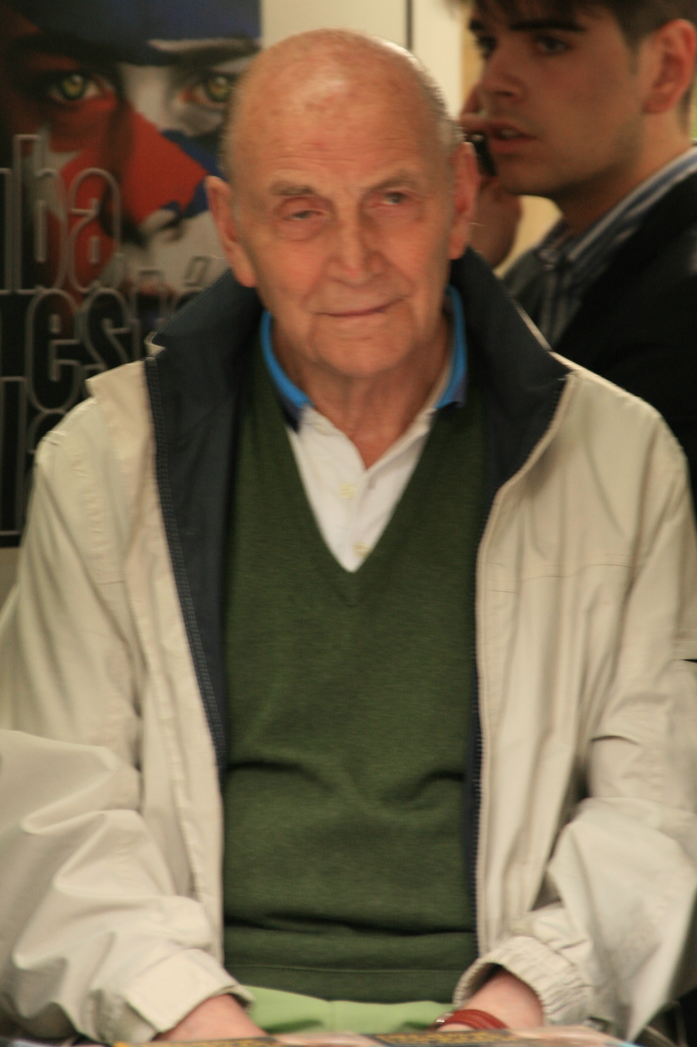 El poeta Marcos Ana en la Feria del Libro de Madrid de 2009